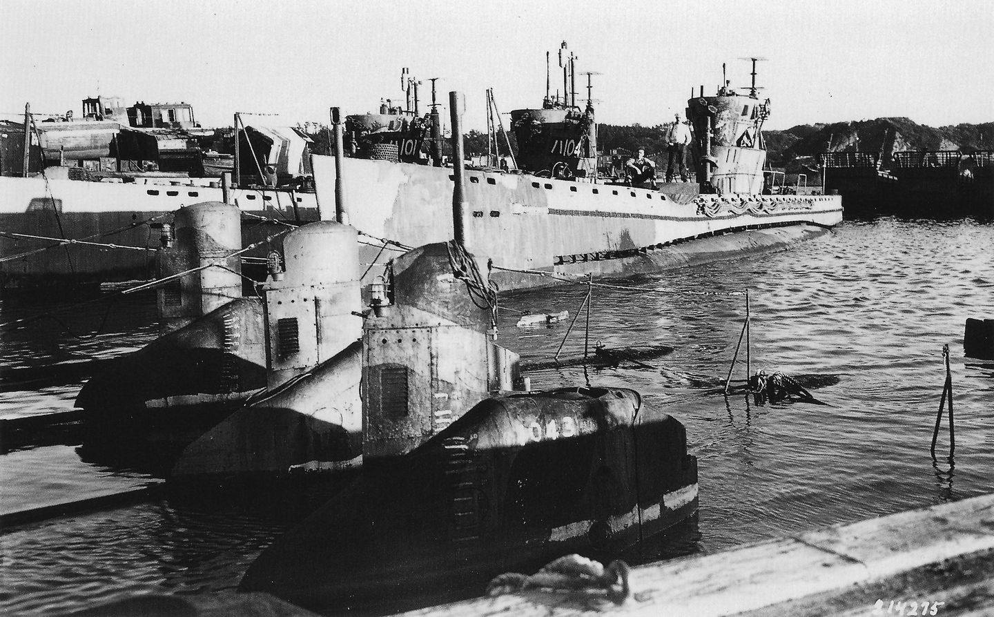 左から波号第101潜水艦、波号第104潜水艦、波号第102潜水艦。横須賀港。撮影日は1945年12月8日とされているが、3艦とも1945年10月に清水付近で海没処分されたことになっている。